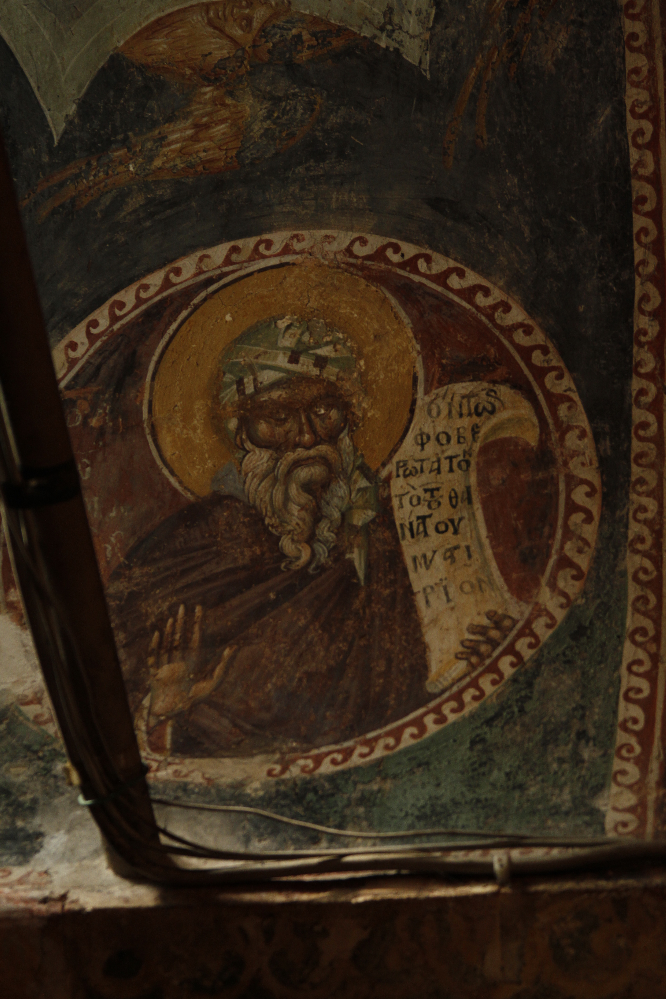 Afresco de São João de Damasco em Chora